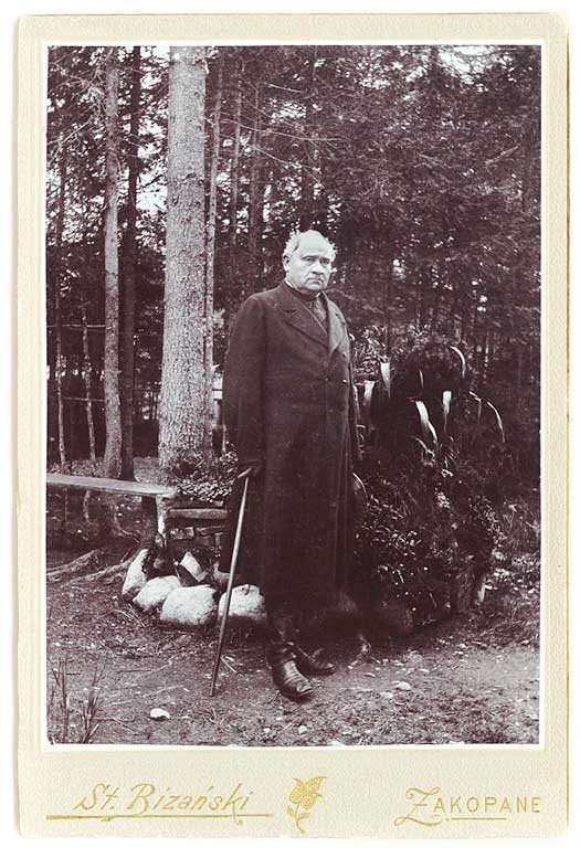 Fotografia księdza Józefa Stolarczyka